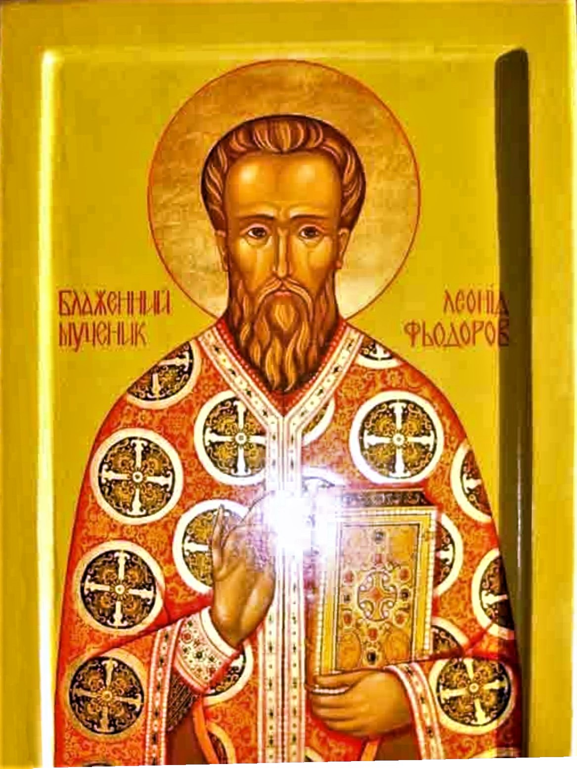 Икона Леонида Федорова в монастыре иезуитов в Новосибирске